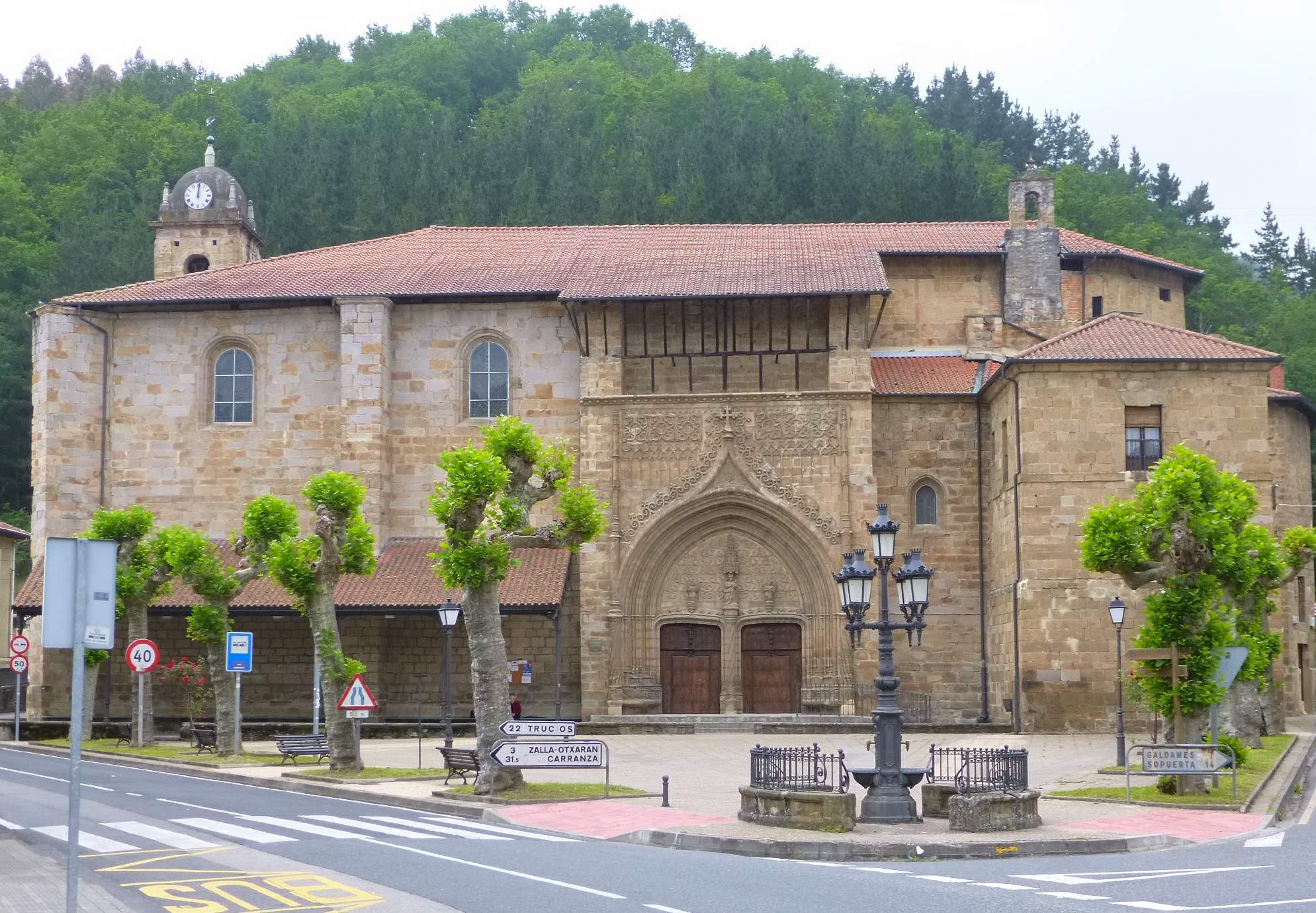 Iglesia de Santa María (Güeñes, Bizkaia)